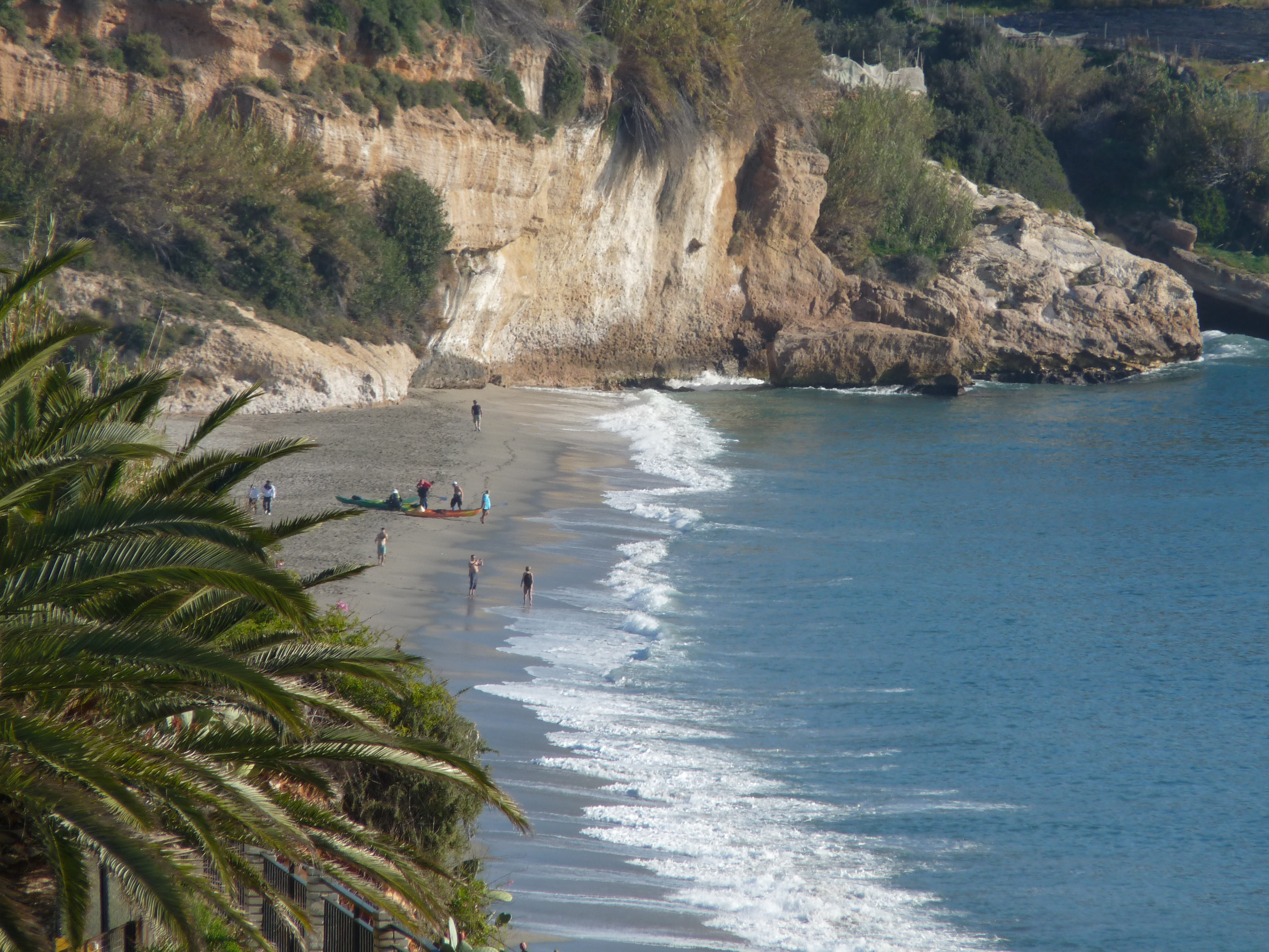 Burriana Beach in Nerja, Spain